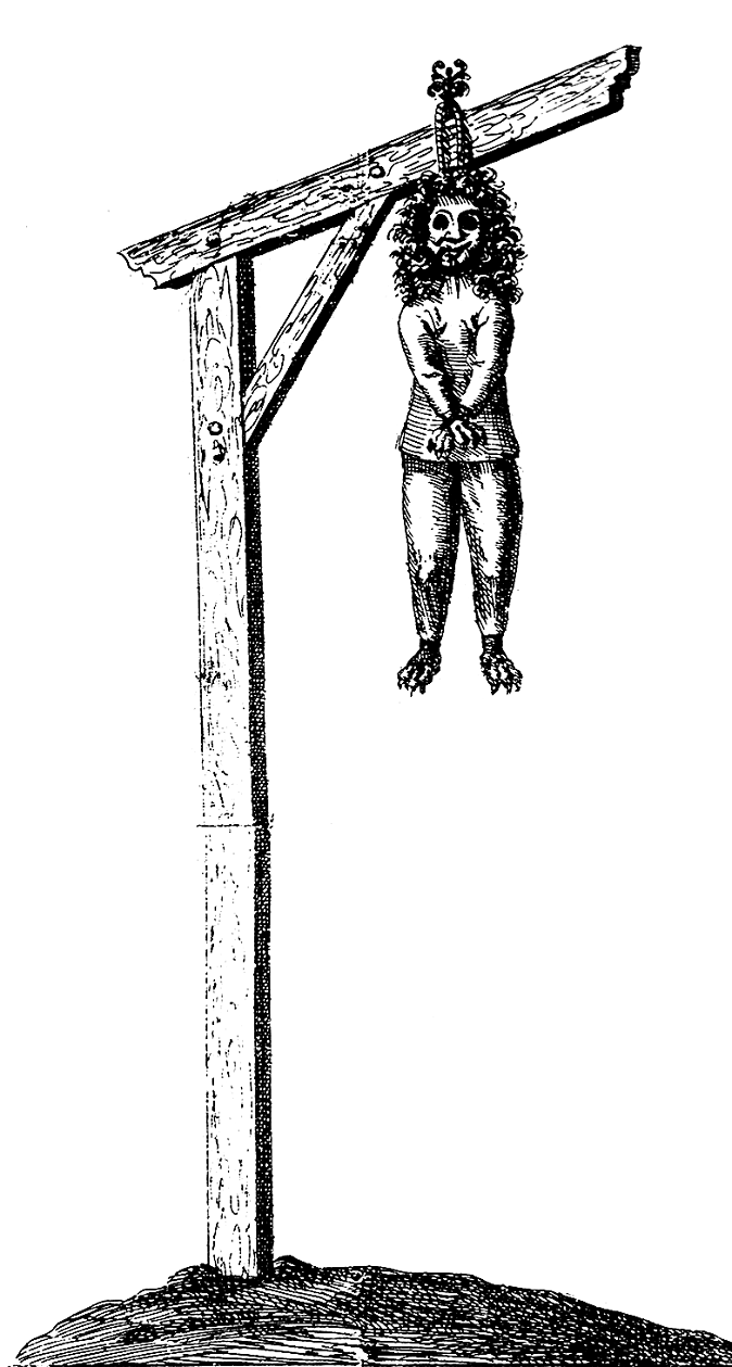 Dieses Flugblatt aus Neuses im Markgrafentum Onolzbach (Ansbach) zeigt einen gehenkten „Werwolf“. Es ist ein gefangener Wolf mit abgehauener Schnauze, aufgeklebtem menschlichem Haar und fleischfarbenen Kleidern.